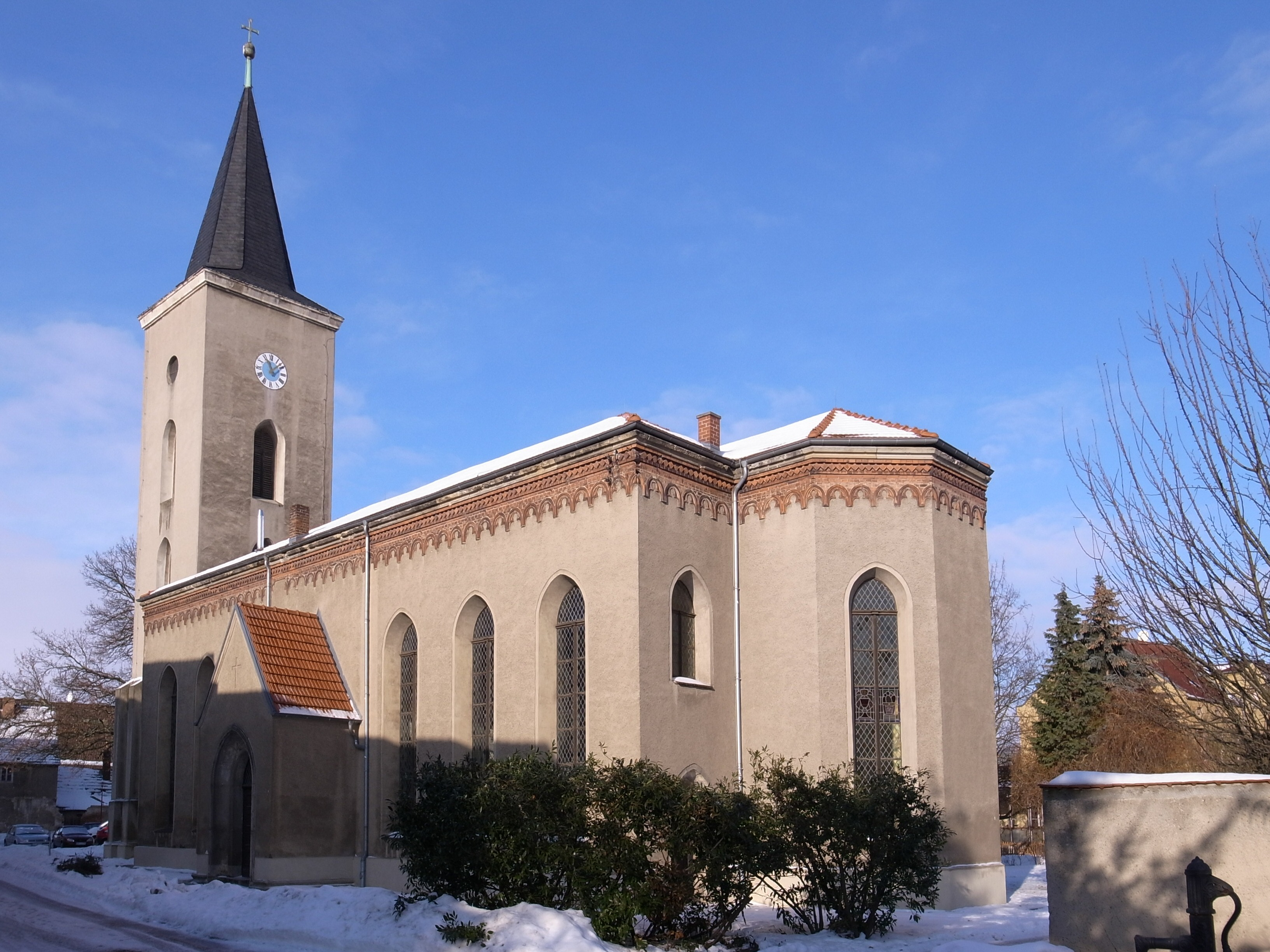 Raguhn, Kirchplatz; Kirche St. Georg